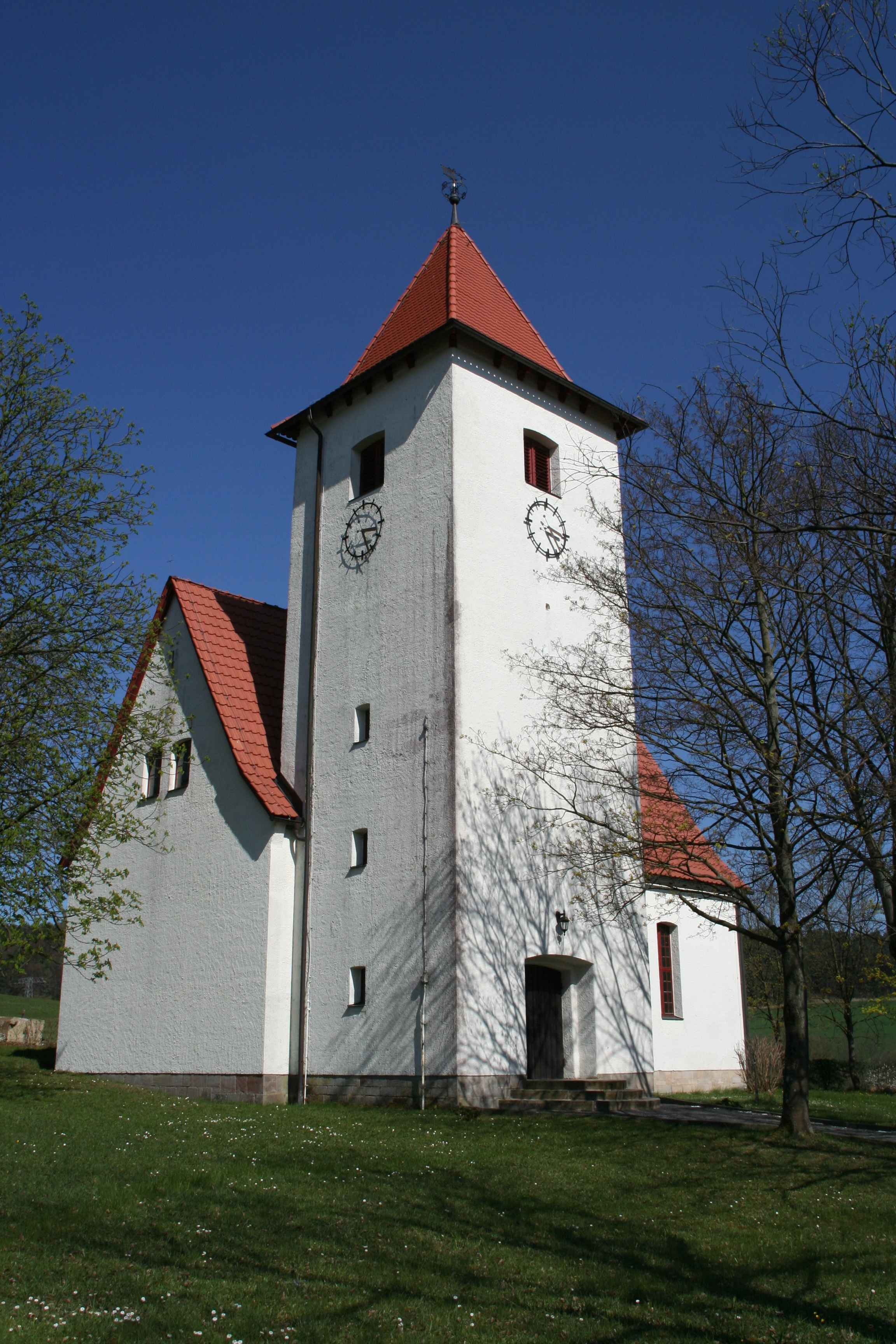 evangelische Matthäuskirche in Bachfeld, Gemeinde Schalkau, Landkreis Sonneberg